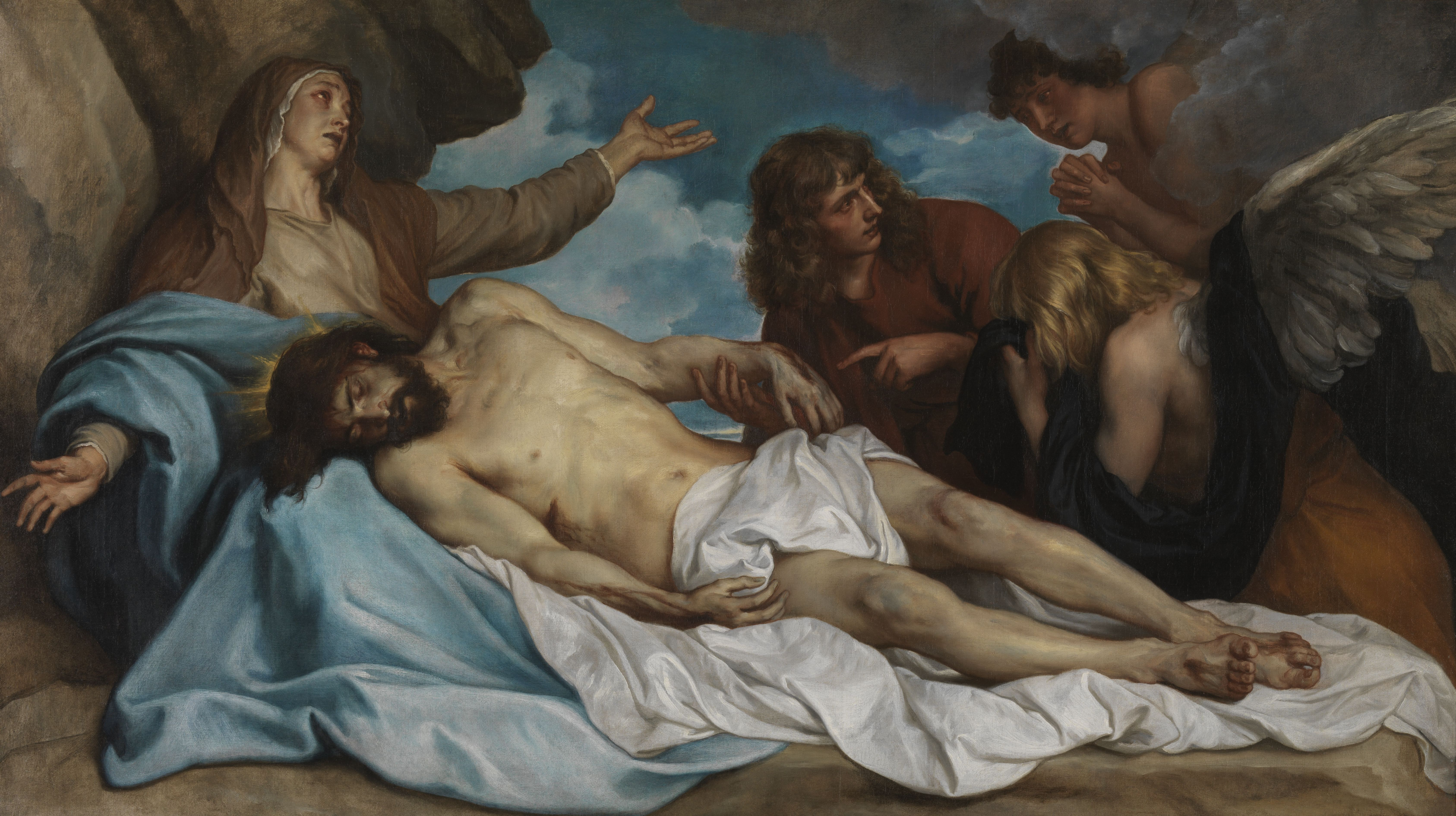 schilderij ( Anthony van Dyck( koninklijk museum voor schone kunsten antwerpen